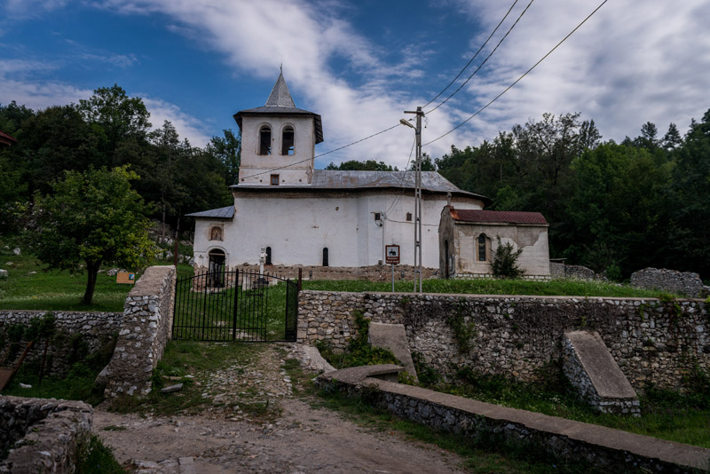 Biserica "Sf. Voievozi" a Mănăstirii Baia de Aramă - vedere sud 03